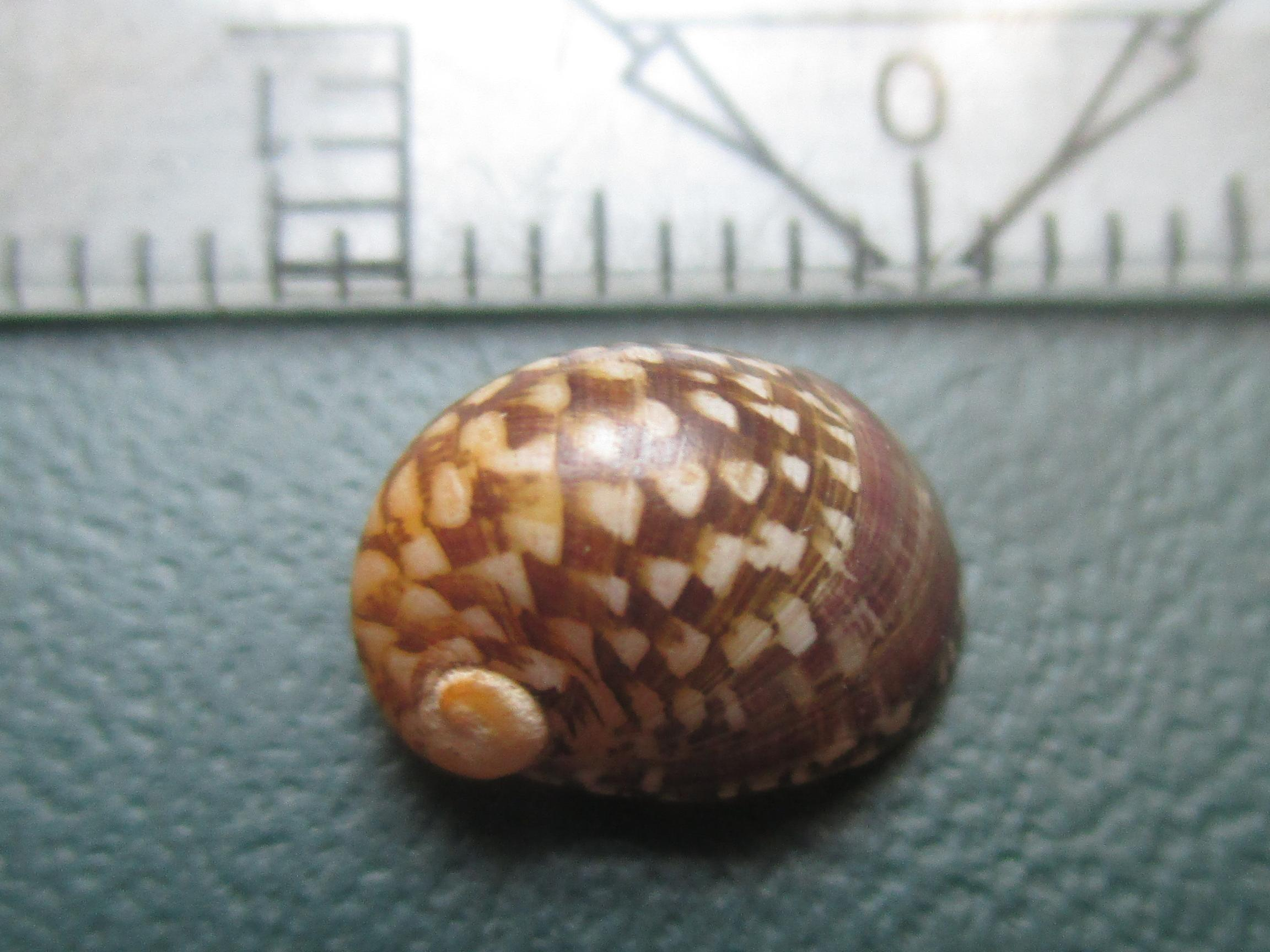 Kahnschnecke aus dem Herault-Fluss bei Saint Guilhem le désert.